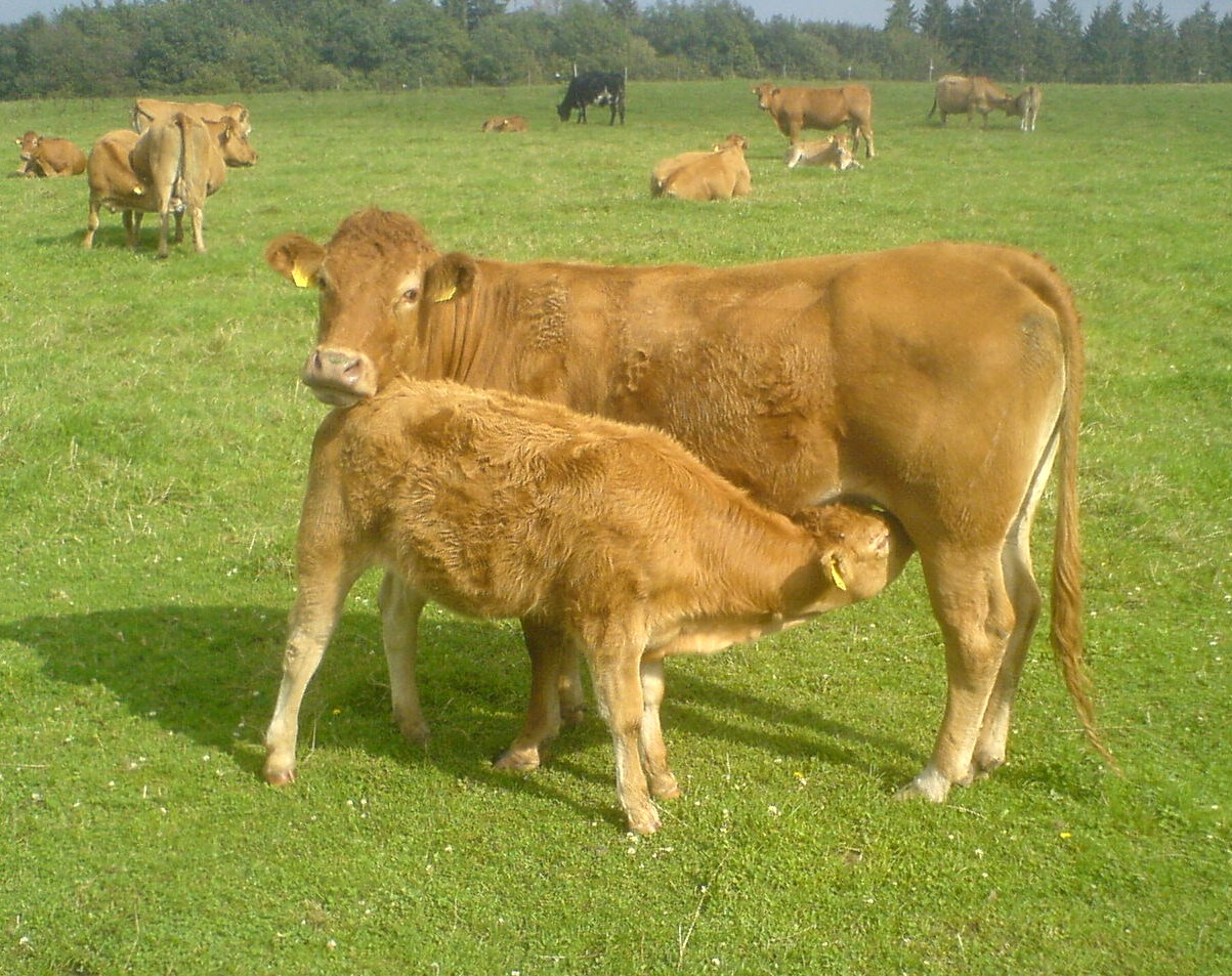 Limousinrinder auf der Freisener Höhe zwischen Freisen und Eckersweiler